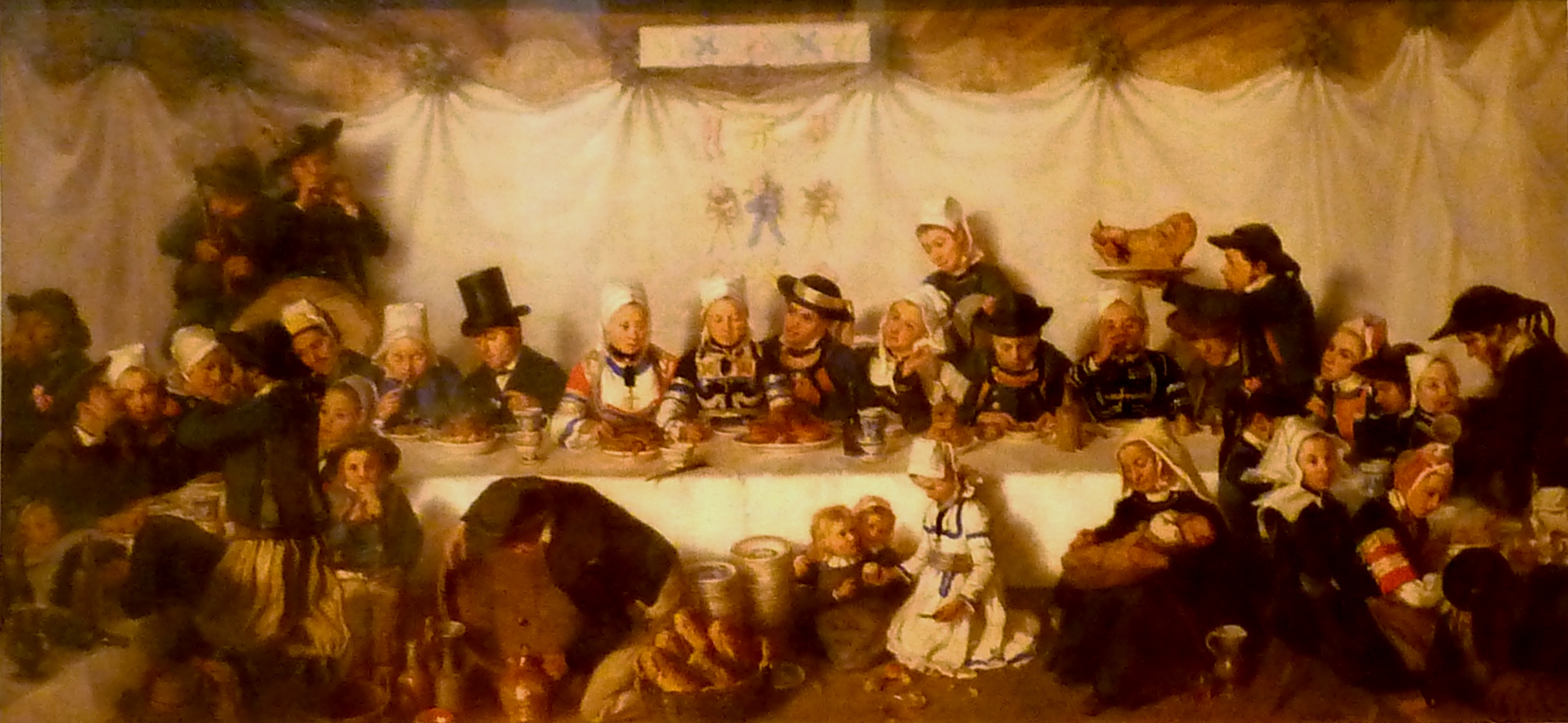 Il pourrait s'agir des noces du fermier de Victor Roussin, propriétaire du château de Keraval en Plomelin (Finistère).